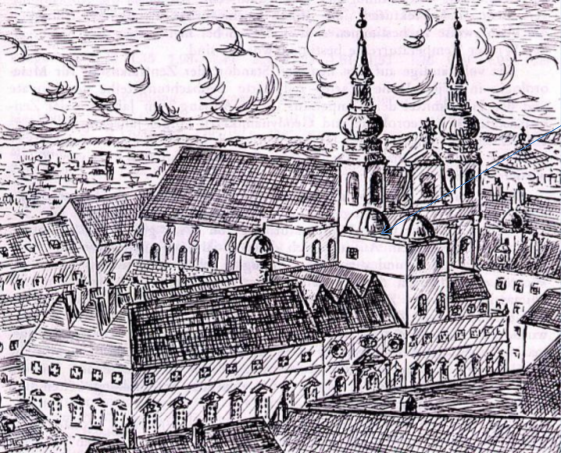 Ansicht von Wien: Neue Aula der Alten Universität mit der Alten Universitätssternwarte (heute Sitz der Österreichischen Akademie der Wissenschaften) und der Jesuitenkirche, von Westen aus gesehen, mit der großen Aula der Universität